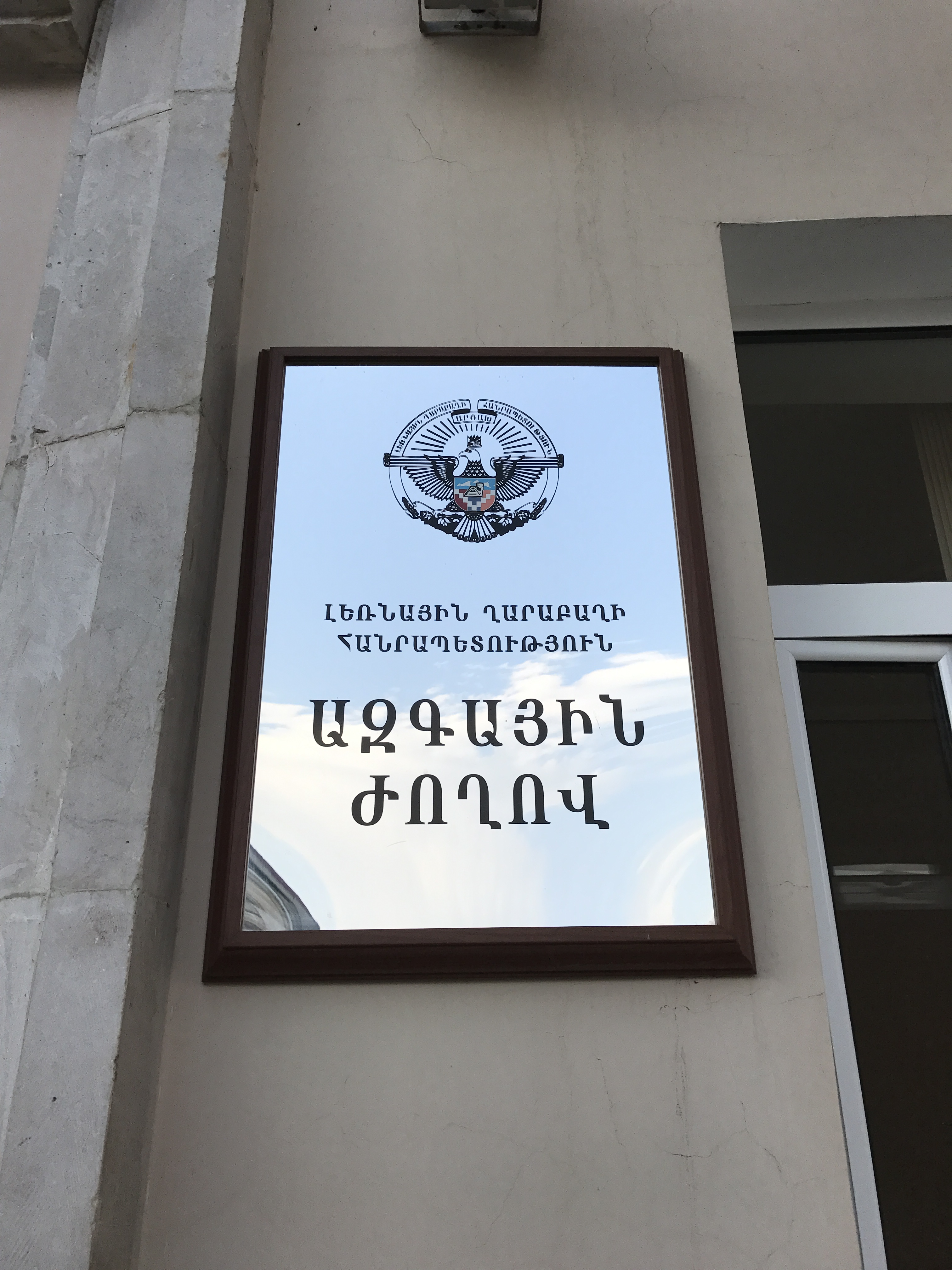 Image de Stepanakert (Artsakh) en 2017.